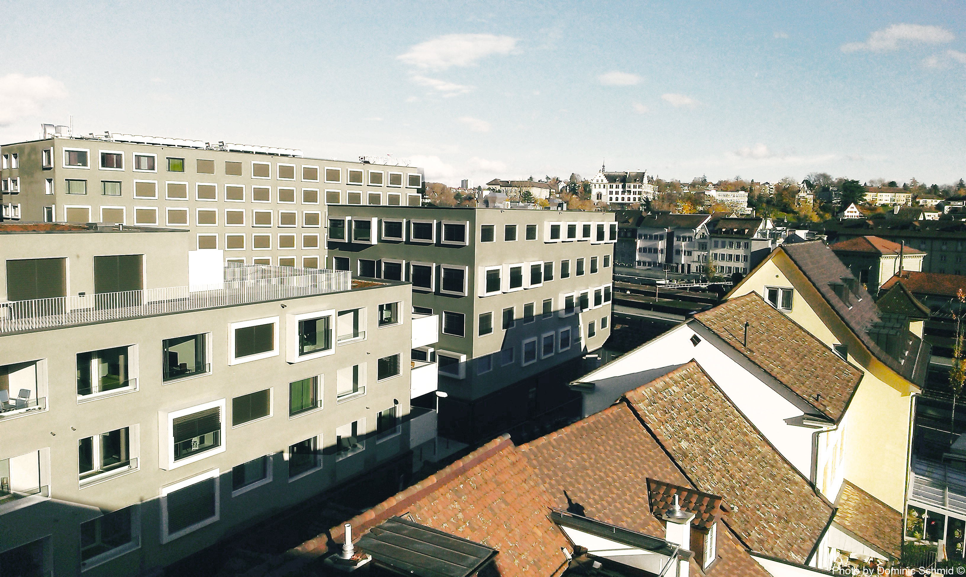 Überbauung Urbahn